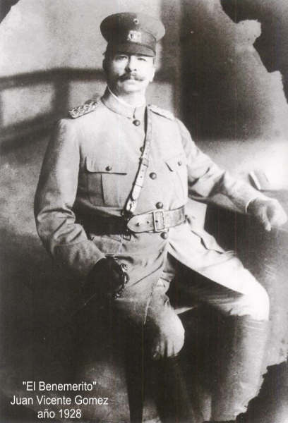 Juan Vicente Gomez